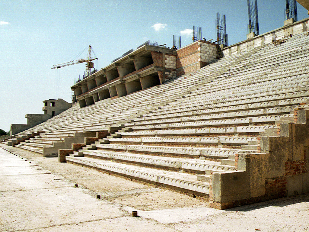 Главная арена спорткомплекса "Шериф" фо время строительства